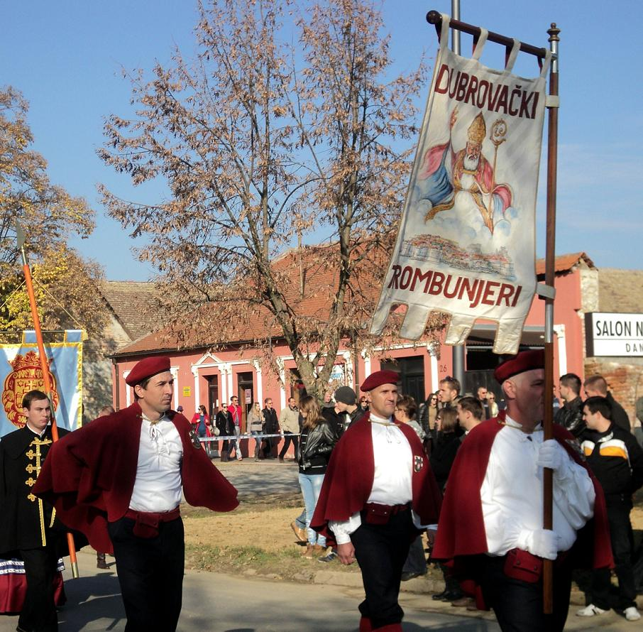 Dubrovački trombunjeri u Koloni sjećanja na žrtvu Vukovara 2012. godine